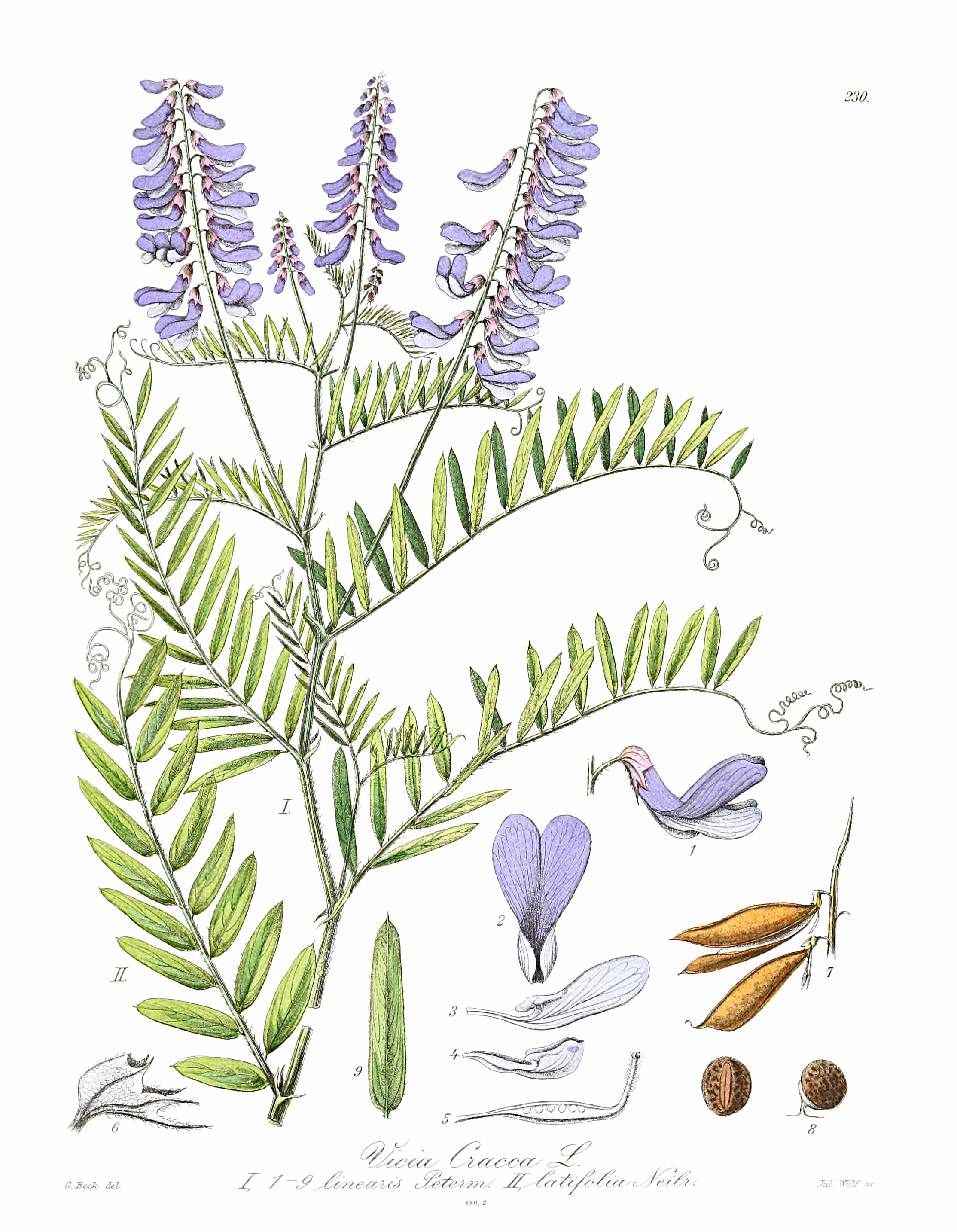 Vicia cracca L.: Tab. 230. Vicia Cracca L. I f. linearis Peterm. Teil blühende Pflanze. 1. Blüte. 2. Fahne (Vexillum). 3. Flügel (Ala). 4. Schiffchen (Carina). 5. Stempel (Pistillum). 6. Kelch (Calyx). 7. Frucht. 8. Same. 9. Blättchen (1—6,8–9+). — II. Blatt f. latifoliae Neilr.